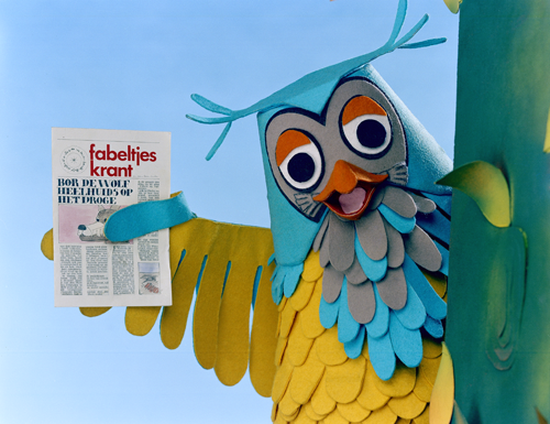 Meneer de Uil met de Fabeltjeskrant